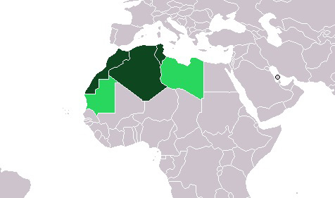 Die Maghreb-Staaten im weiteren Sinne